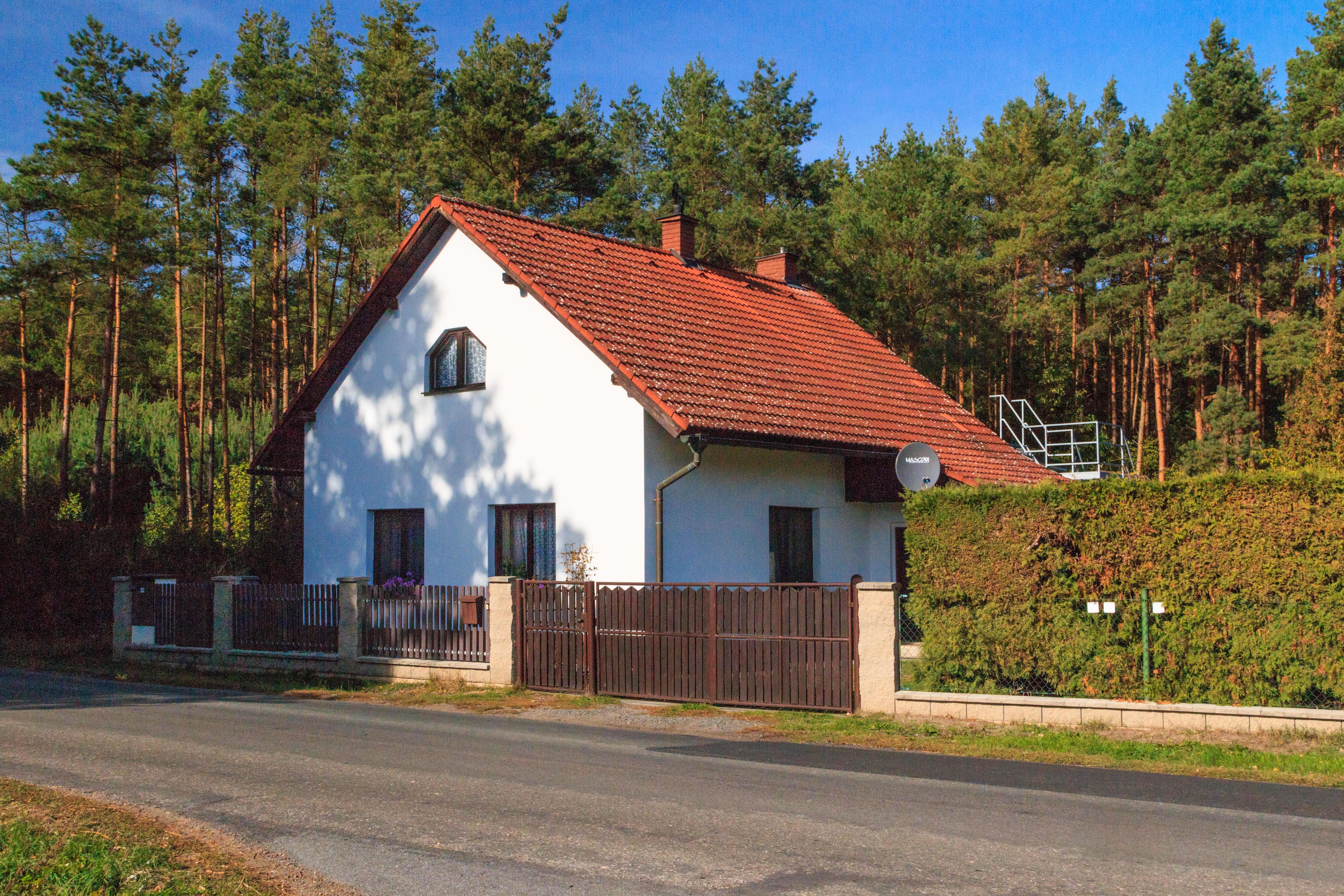 Semínská Vrata - dům čp. 16 Project: Vodstvo.